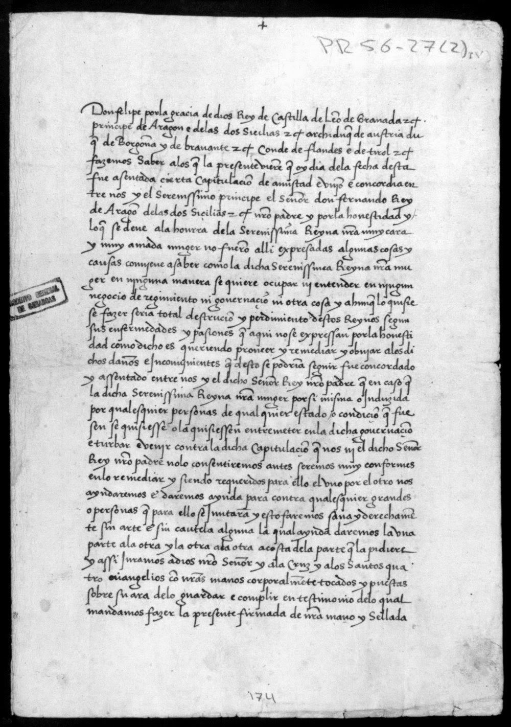 Texto de la Concordia de Villafáfila, versión de Felipe el Hermoso